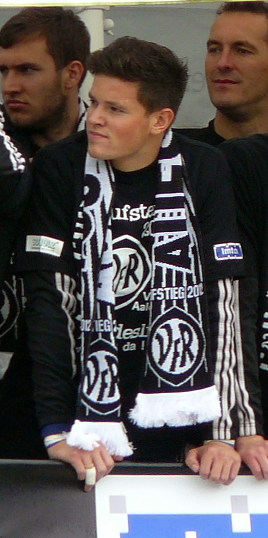 Marcel Wehr bei der Aufstiegsfeier des VfR Aalen am 5. Mai 2012